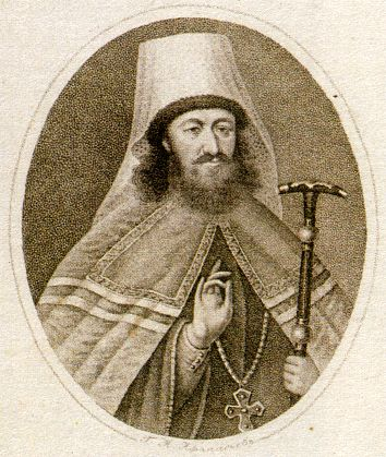 Metropolitan_Stephen_Yavorsky.jpg: Стефпн Яворський